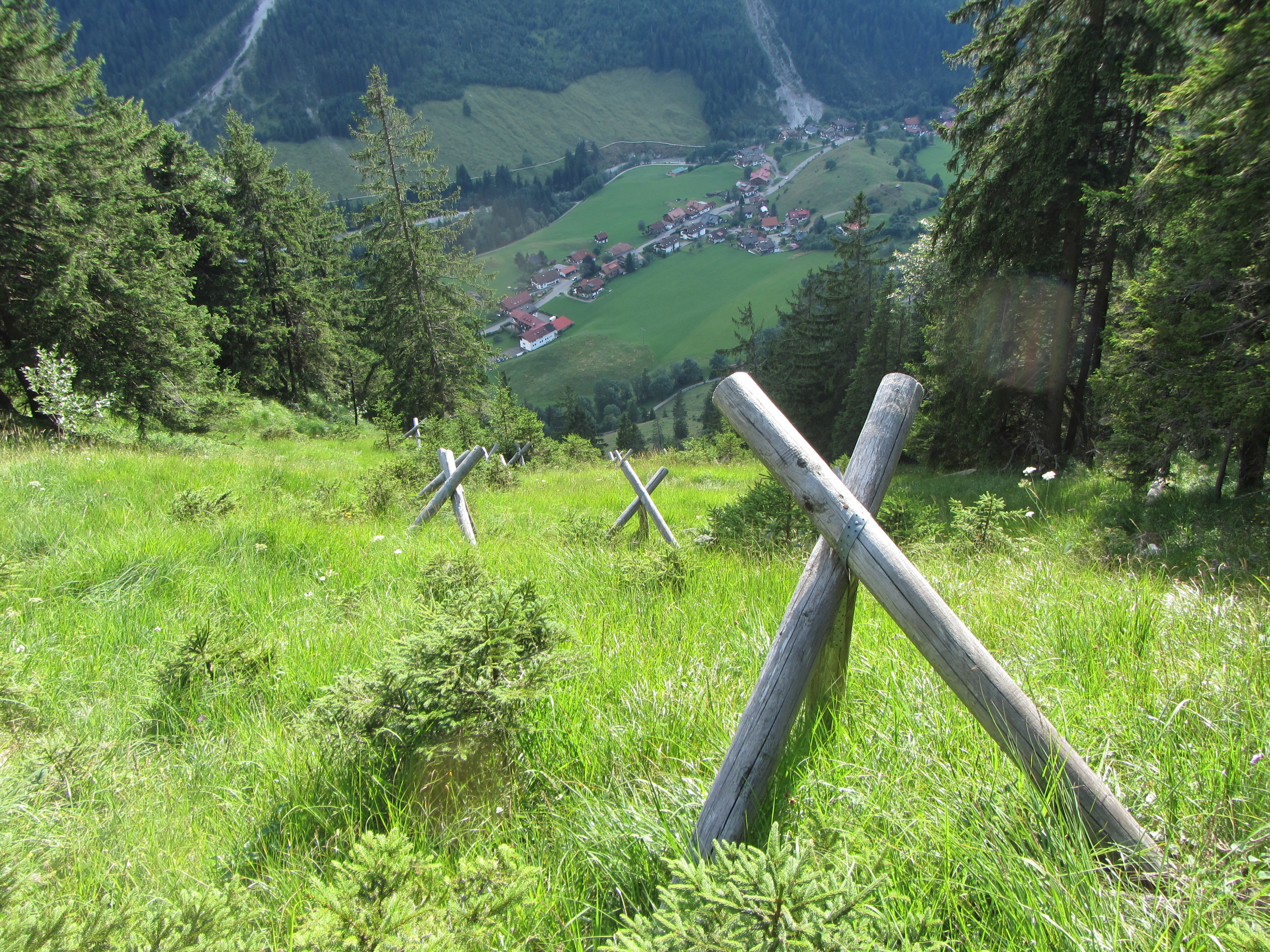 Schutzwaldsanierungsfläche mit Dreibein-Böcken oberhalb von Hinterstein, Lkr. Oberallgäu